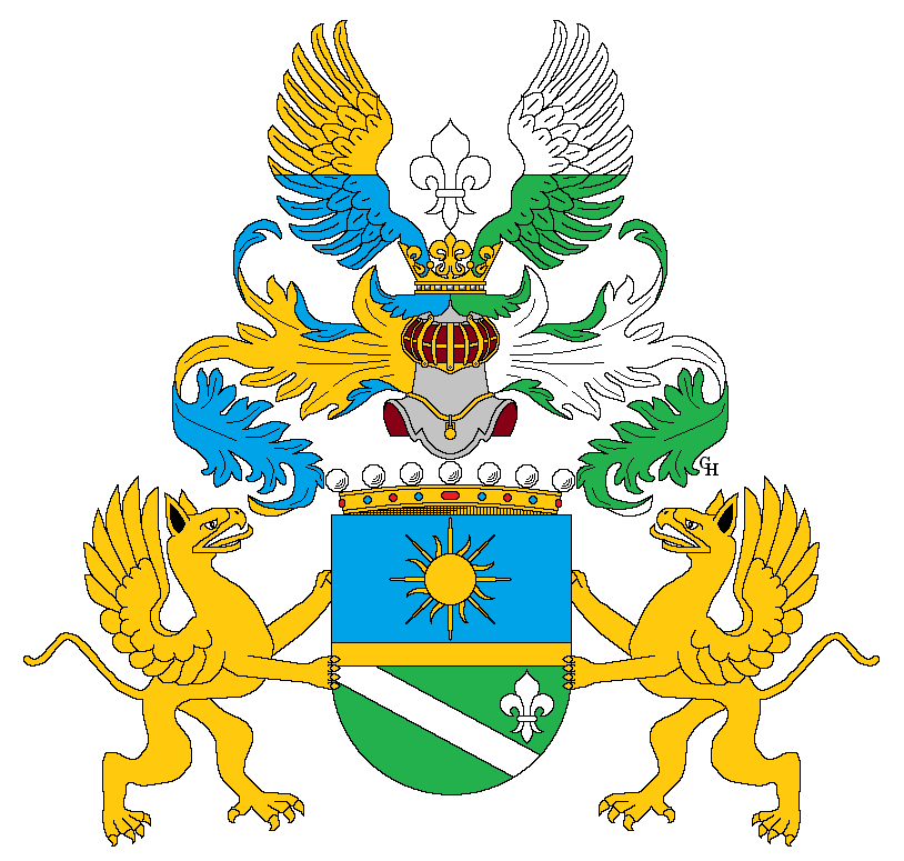 Wappen des österreichischen Gynäkologen, Fabriks- und Gutsbesitzers sowie Politikers Dr. Karl Chiari (1849–1912), das diesem 1908 anlässlich seiner Erhebung in den österreichischen Freiherrenstand verliehen und 1917 auf seinen Bruder, den Laryngologen Dr. Ottokar Chiari (1853–1918) übertragen wurde. Zeichnung von Gerd Hruška ( Für weitere Informationen zu dieser Standeserhebung siehe (